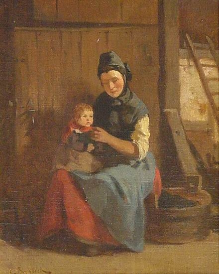 Carl Breitbach, Junge Mutter mit ihrem Kleinkind, Öl auf Leinwand